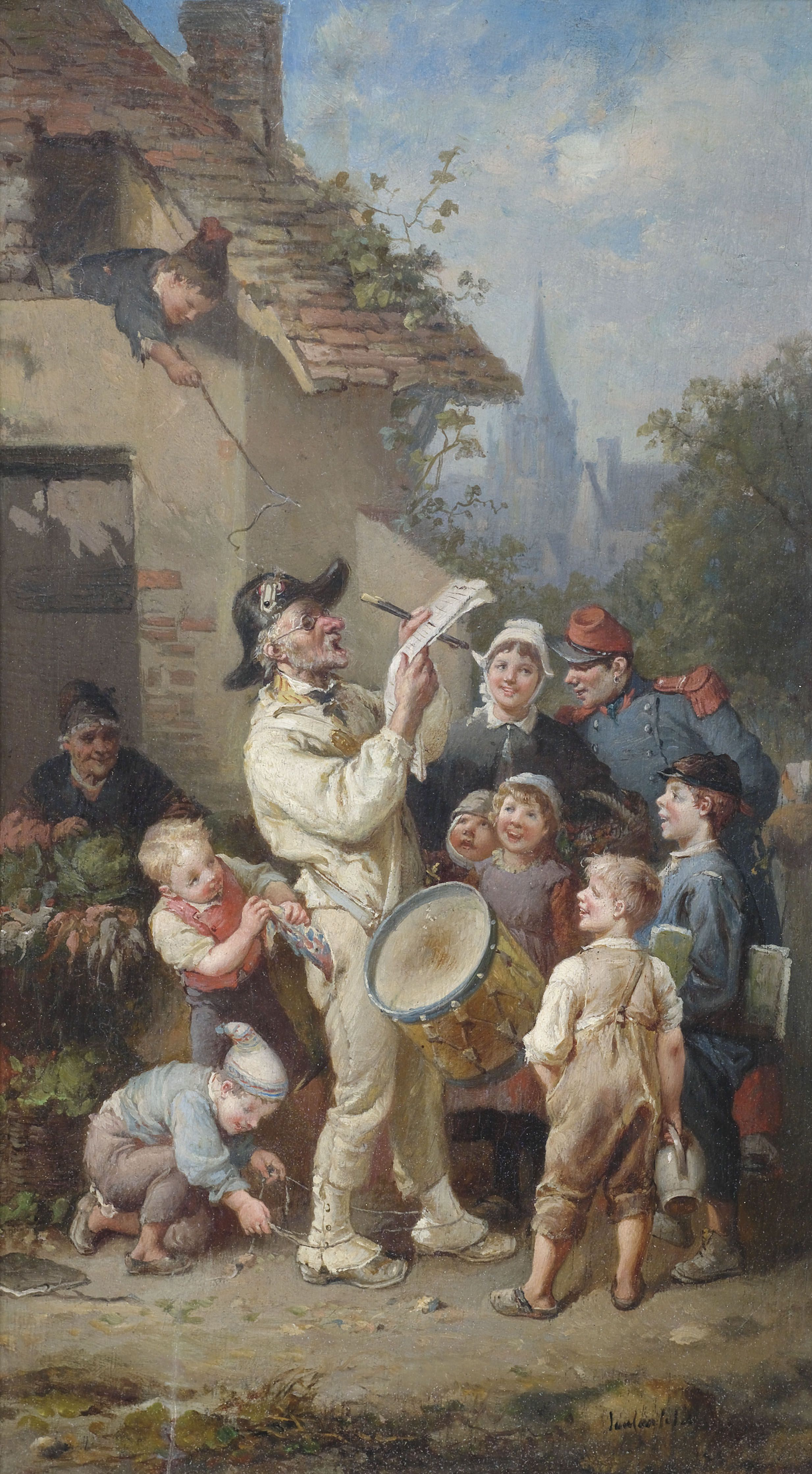 Ein Ausrufer wird von Kindern geneckt. Öl auf Holz, 33 x 18 cm, signiert